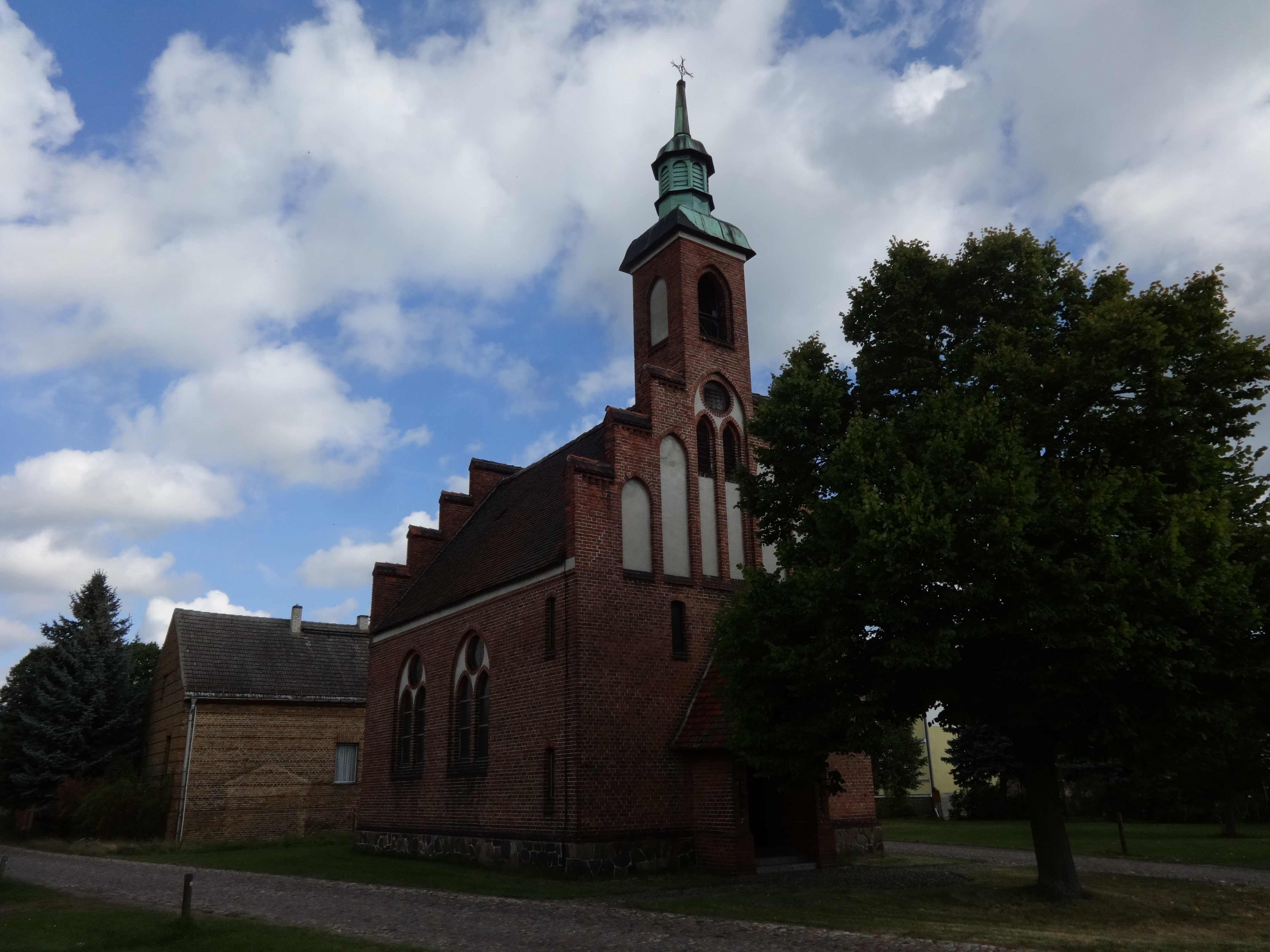 Die Dorfkirche in Lühsdorf ist eine Saalkirche aus dem Jahr 1901 in Treuenbrietzen im Landkreis Potsdam-Mittelmark in Brandenburg.